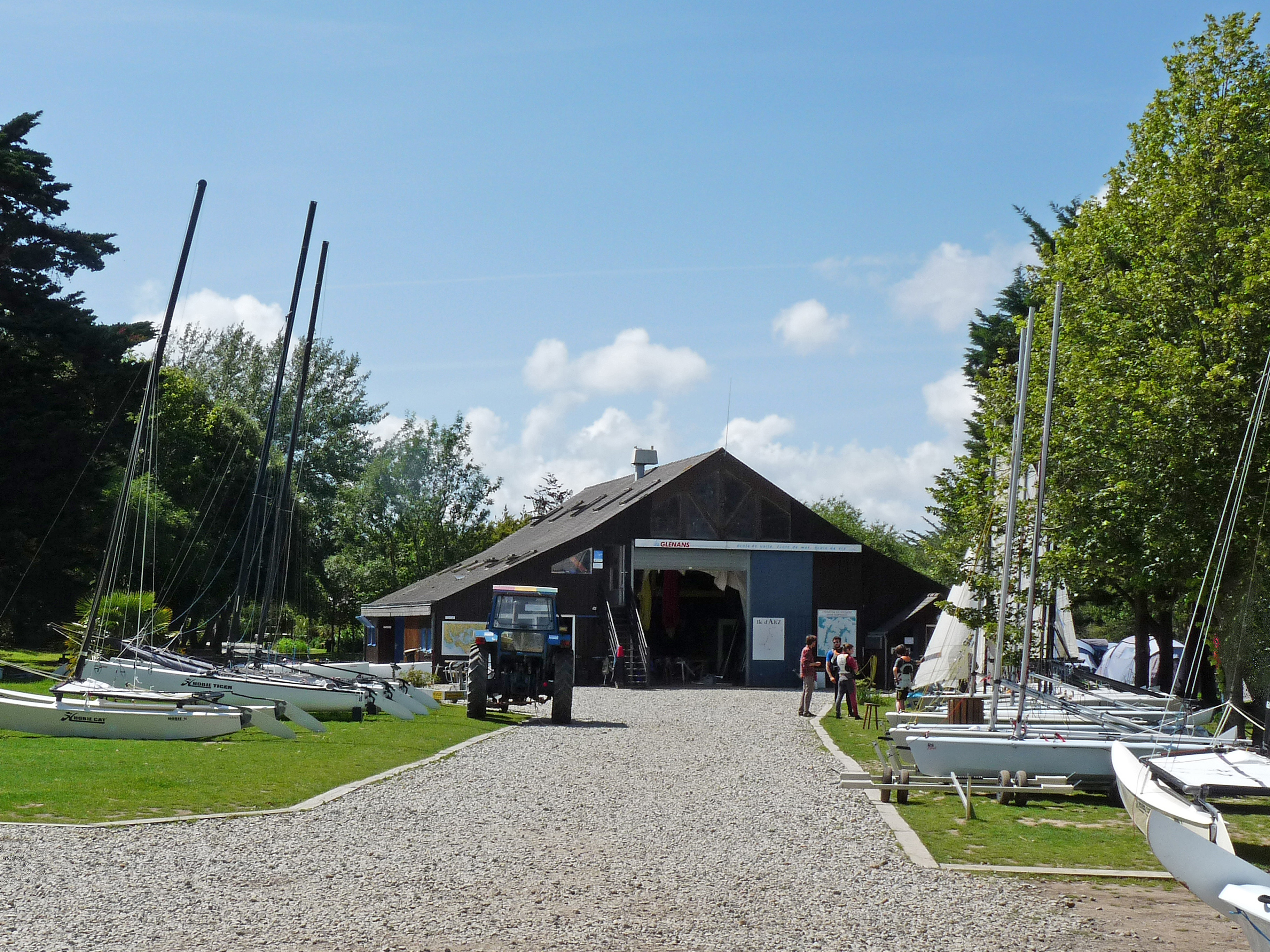 Ecole de voile des Glénans à l'île d'Arz (Morbihan)